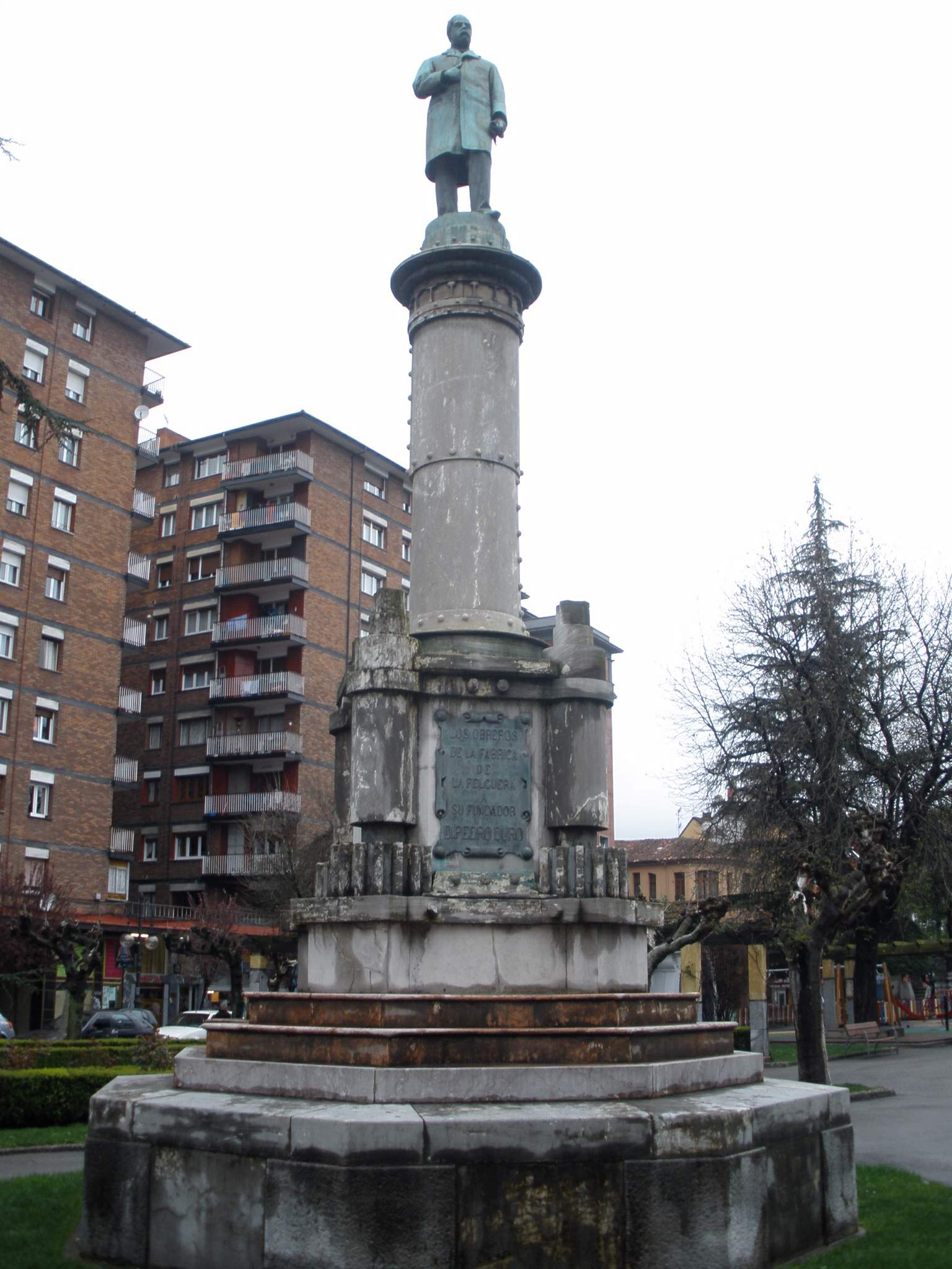 La Felguera de Langreo (Asturias). Monumento a Pedro Duro